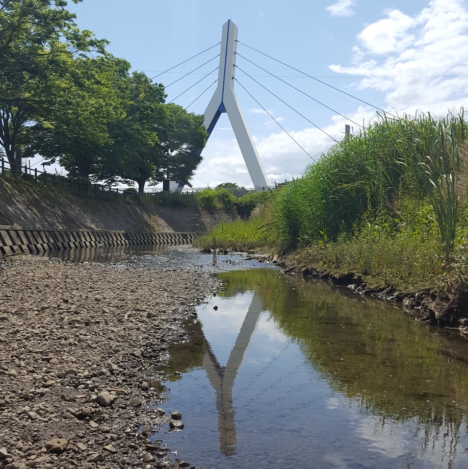 高部みずべ公園（静岡市清水区能島）